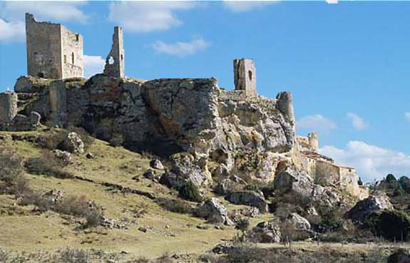 Calatañazor-Castillo La imagen es mía y la protejo bajo GFDL Categoría:España (imagen)